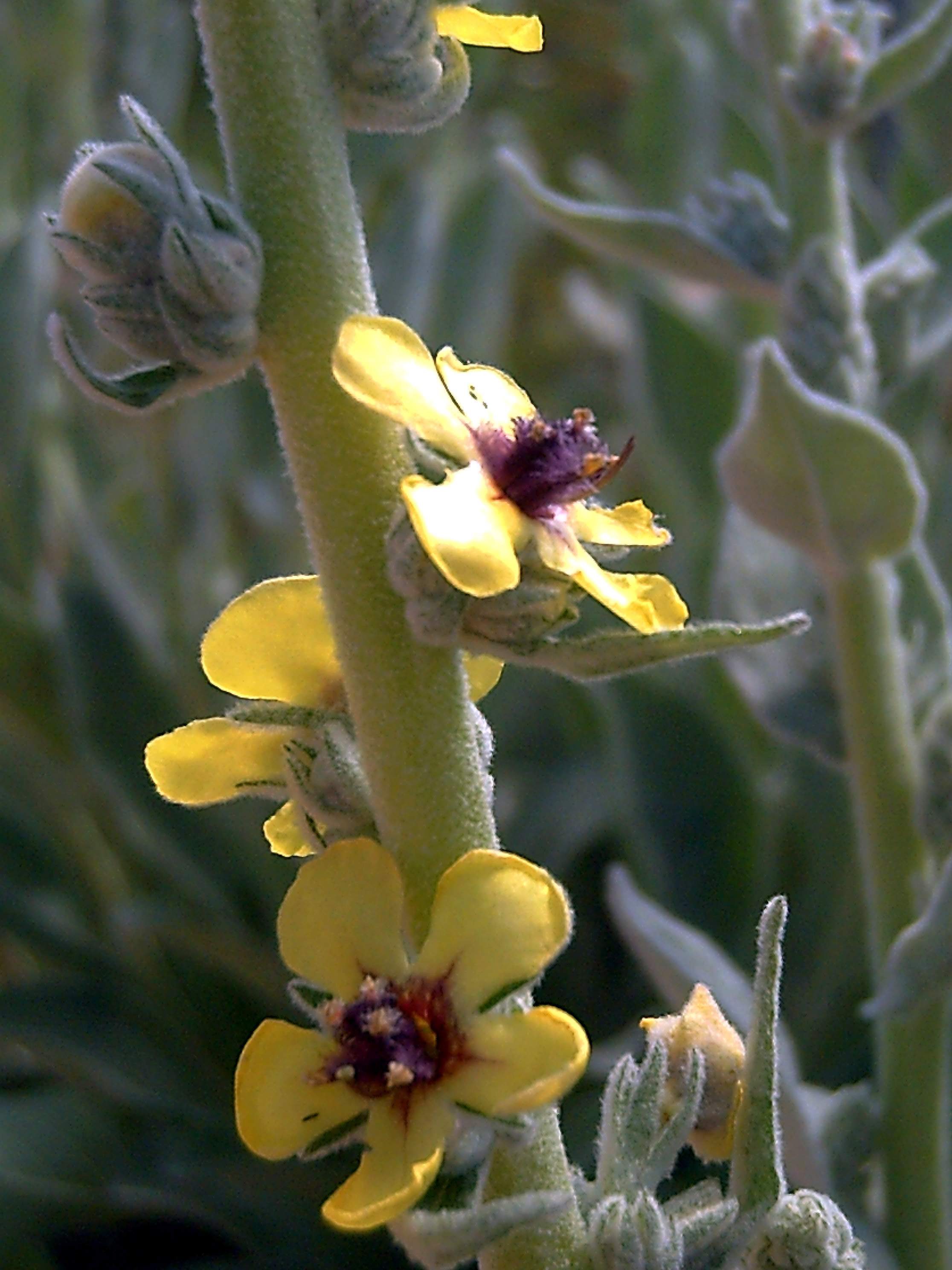 Verbascum virgatum flower closeup in Campo de Calatrava, Spain